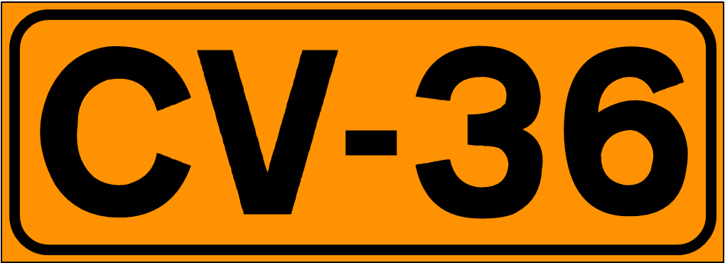 Inidcador de la Carretera de la Comunidad Valenciana CV-36